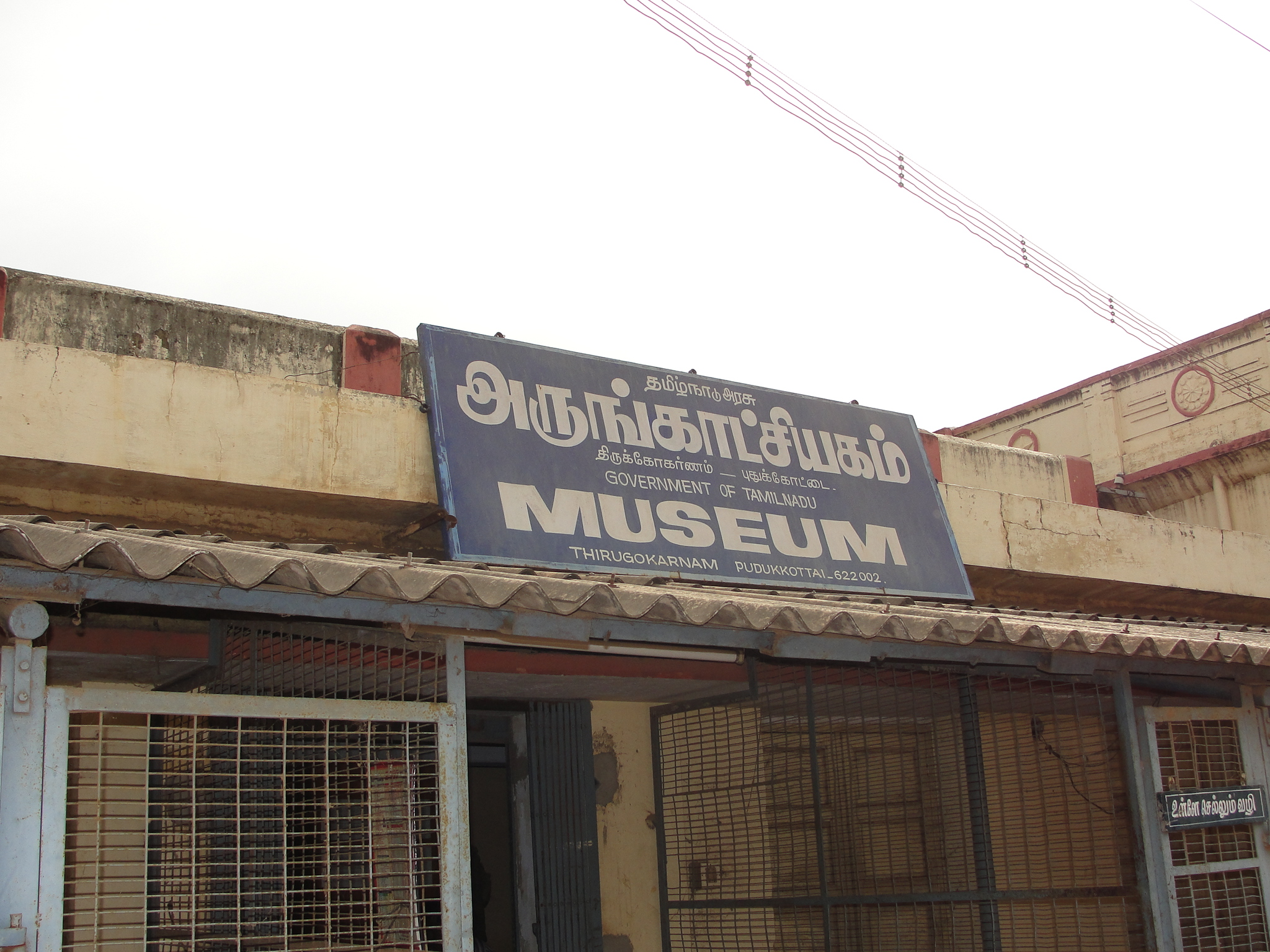 புதுக்கோட்டை அருங்காட்சியத்தின் பெயர்ப்பலகை